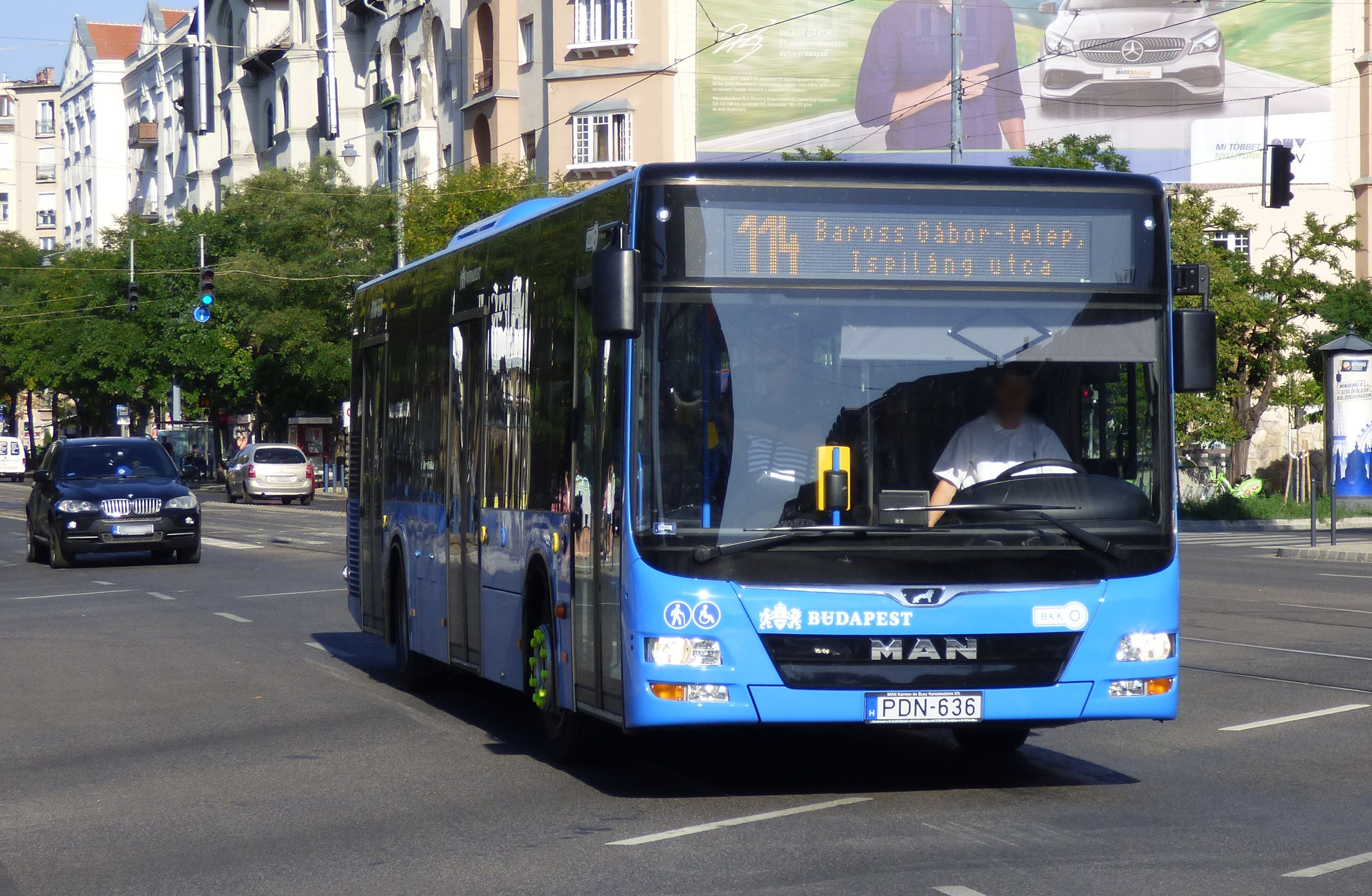 MAN A21 Lion's City a 114-es vonalon, Budapest, Bartók Béla út (frsz. PDN-636)